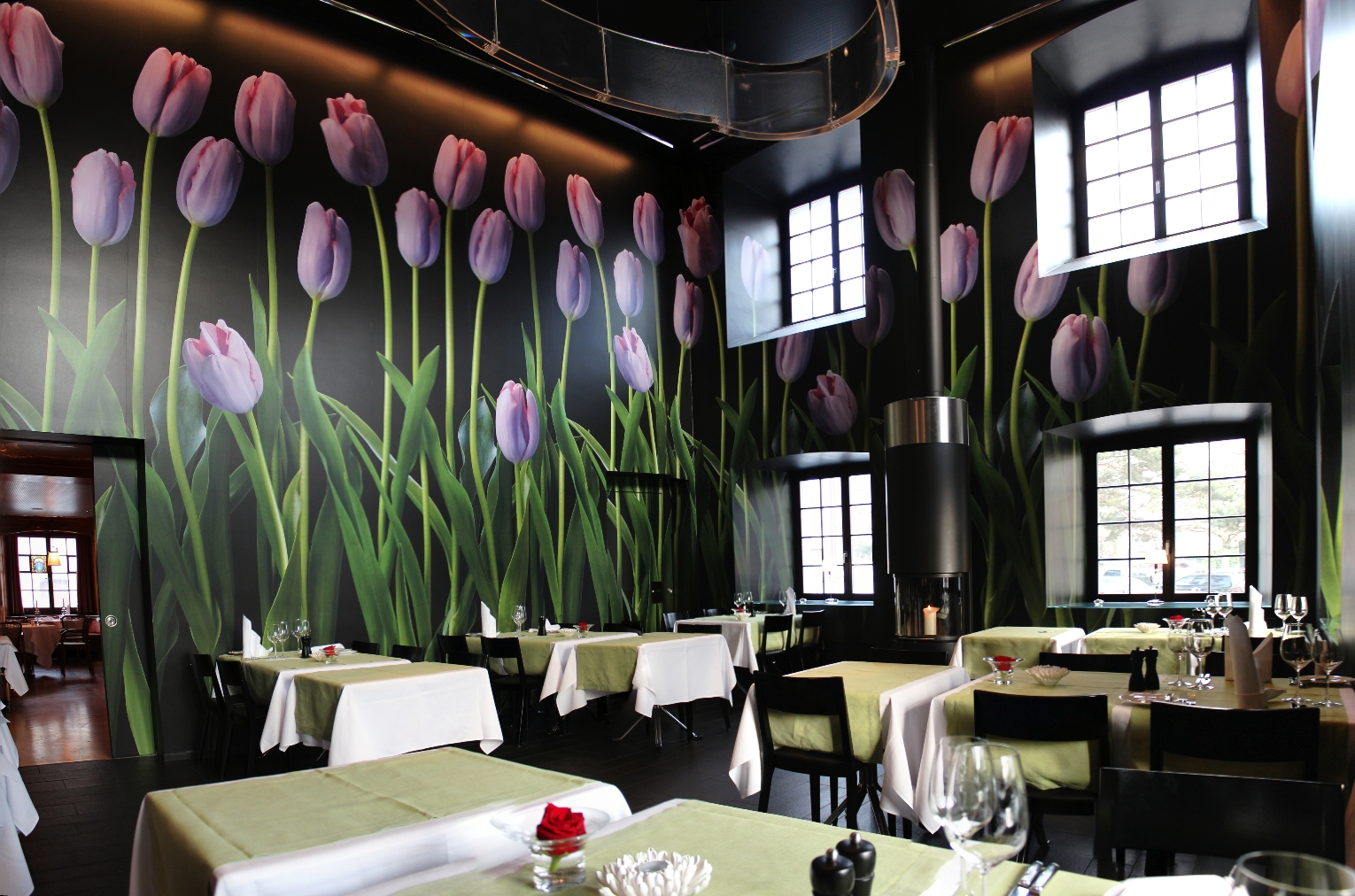 Restaurant "Taverne zur Krone"